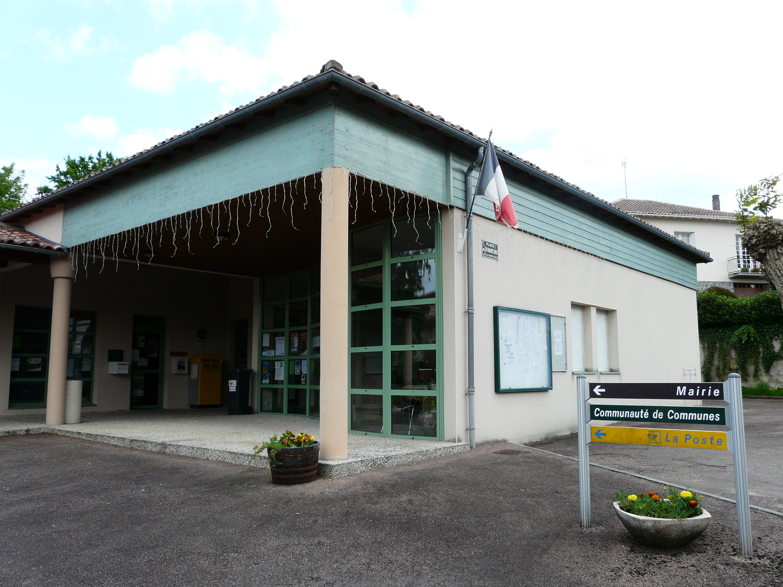 La mairie de Bussière-Badil, Dordogne, France.